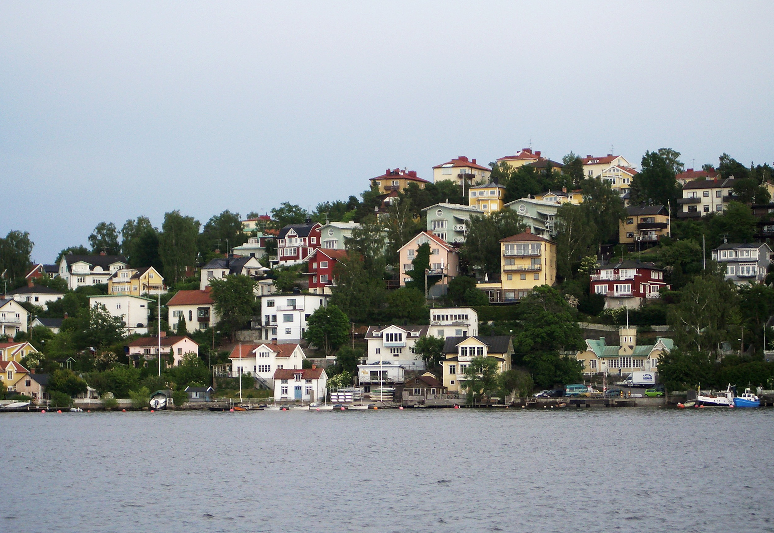 Backebogatan och Pettersbergsvägen sett från Mälaren.